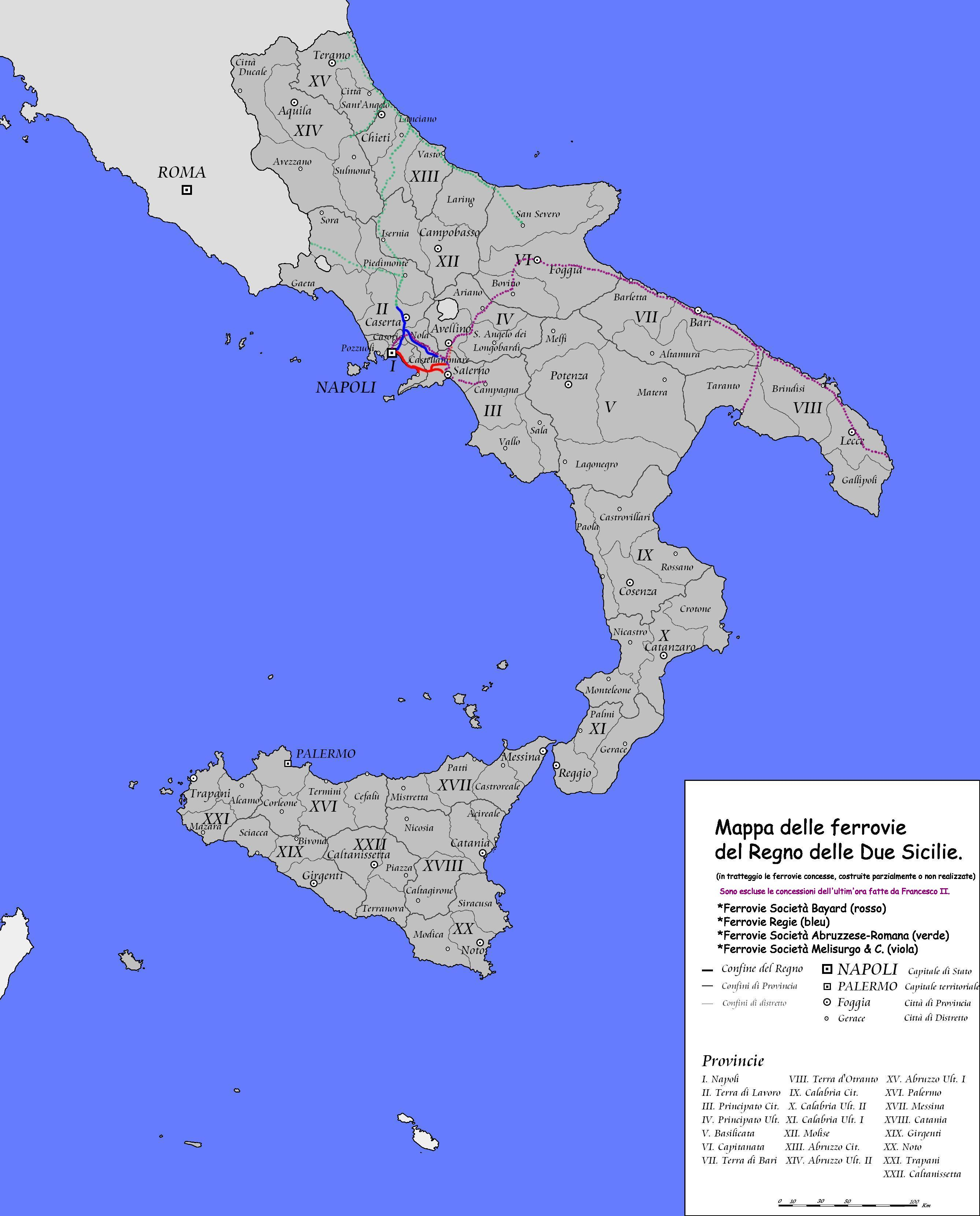 La presente mappa è una elaborazione del File:Provincie duosiciliane.png esistente su Commons.